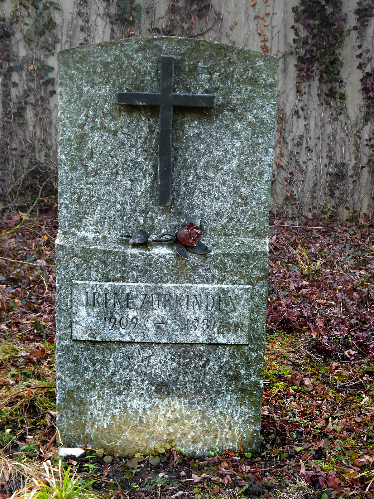 Irène Zurkinden (1909–1987) Künstlerin, Malerin, Zeichnerin, Lithografin, Illustratorin, Ehrengrab auf dem Friedhof Hörnli, Riehen, Basel-Stadt